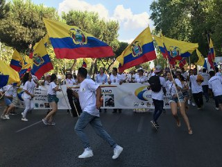 Ecuador celebra junto a Madrid su independencia. Marta Higueras acude a las fiestas en Ciudad Lineal. La alcaldesa en funciones, Marta Higueras, asistió ayer a la fiesta por la Independencia de Ecuador que tuvo lugar en el distrito de Ciudad Lineal. Higueras agradeció a la comunidad ecuatoriana que la hubieran invitado a esta fiesta y compartió con las decenas de asistentes el mensaje de la alcaldesa, Manuela Carmena, que le pidió que enviara un “abrazo muy fuerte” a esta comunidad.